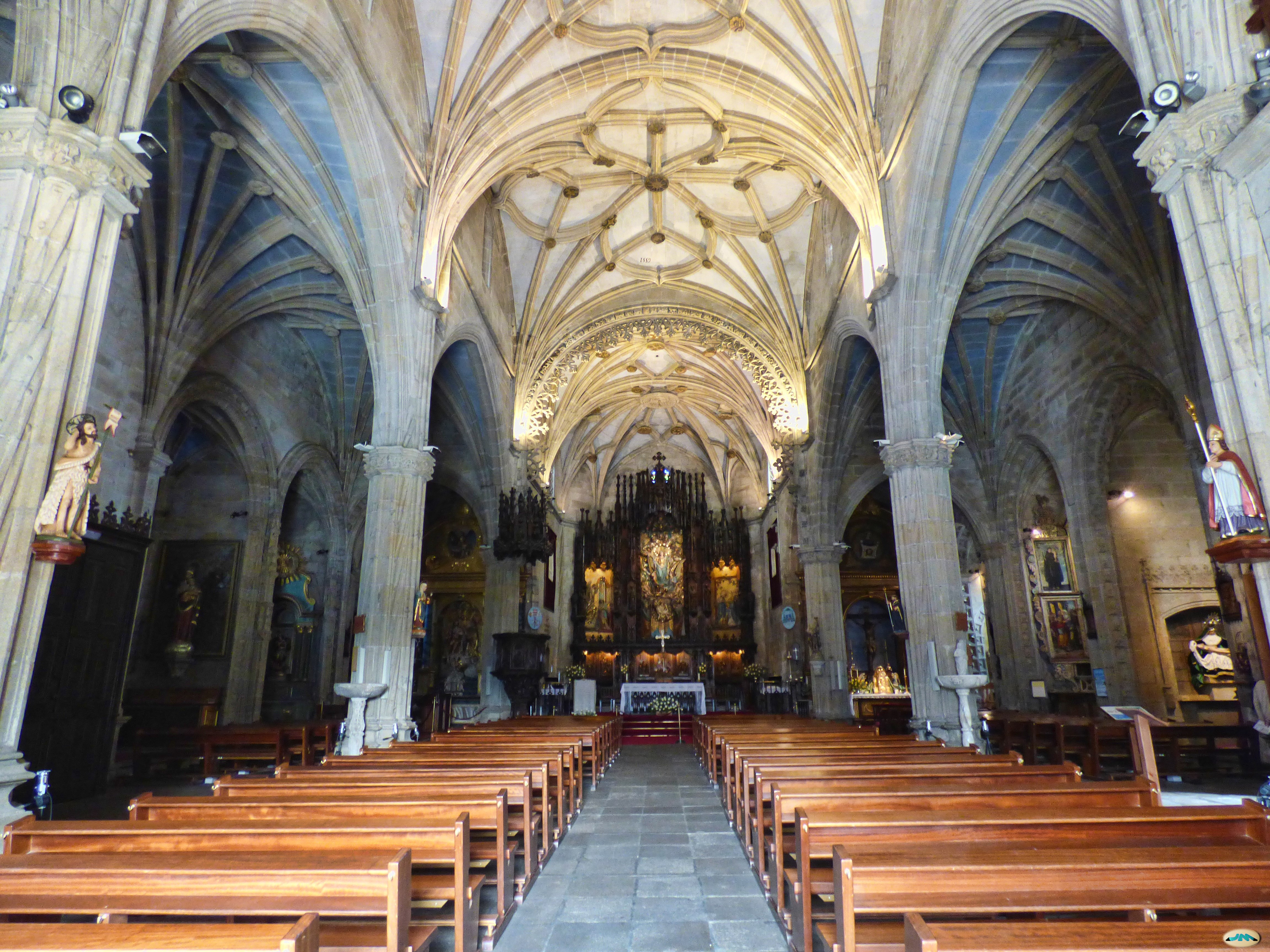 Pontevedra-Santa María a media luz natural